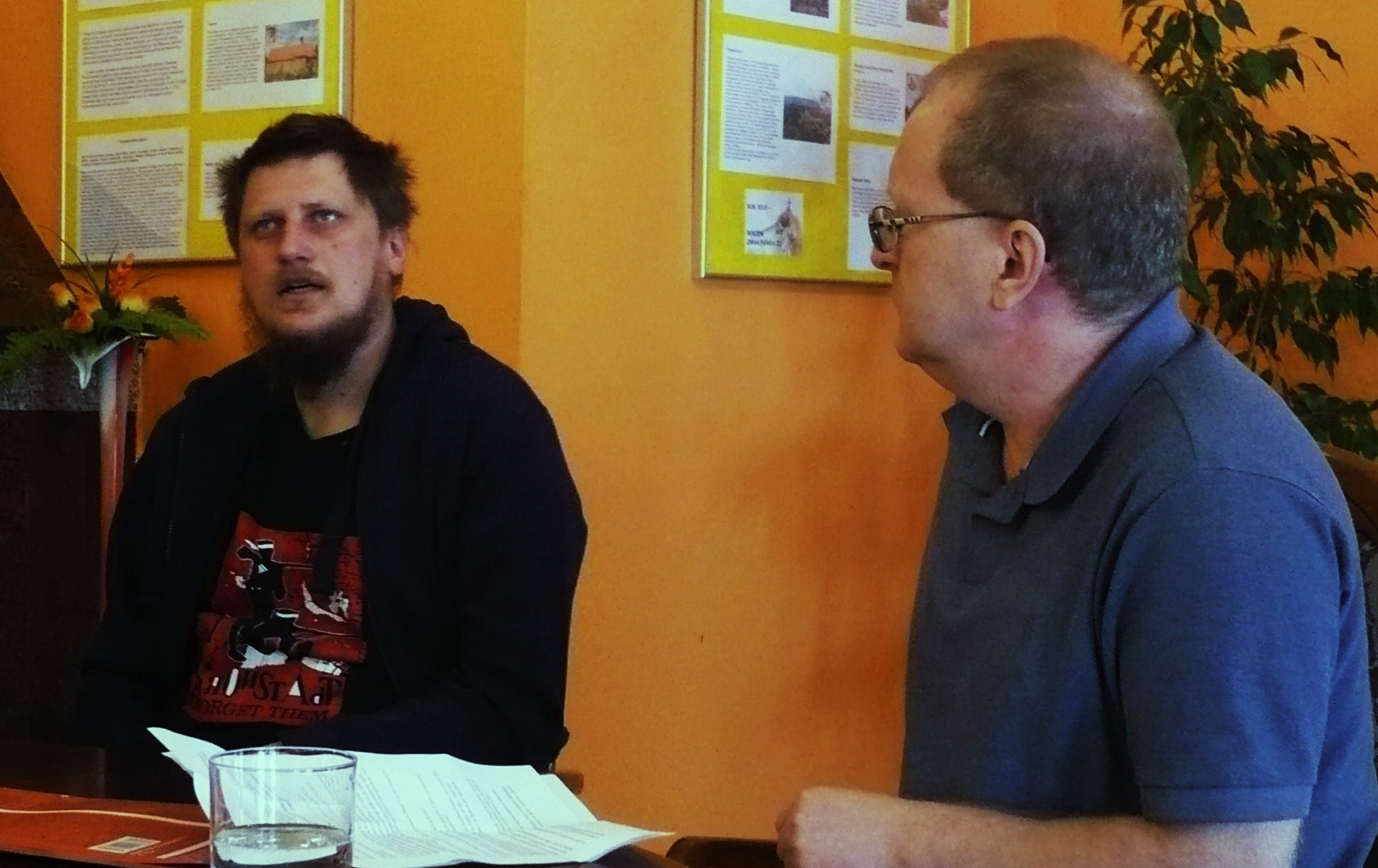 Konrad Góra, Karol Maliszewski w MBP w Nowej Rudzie